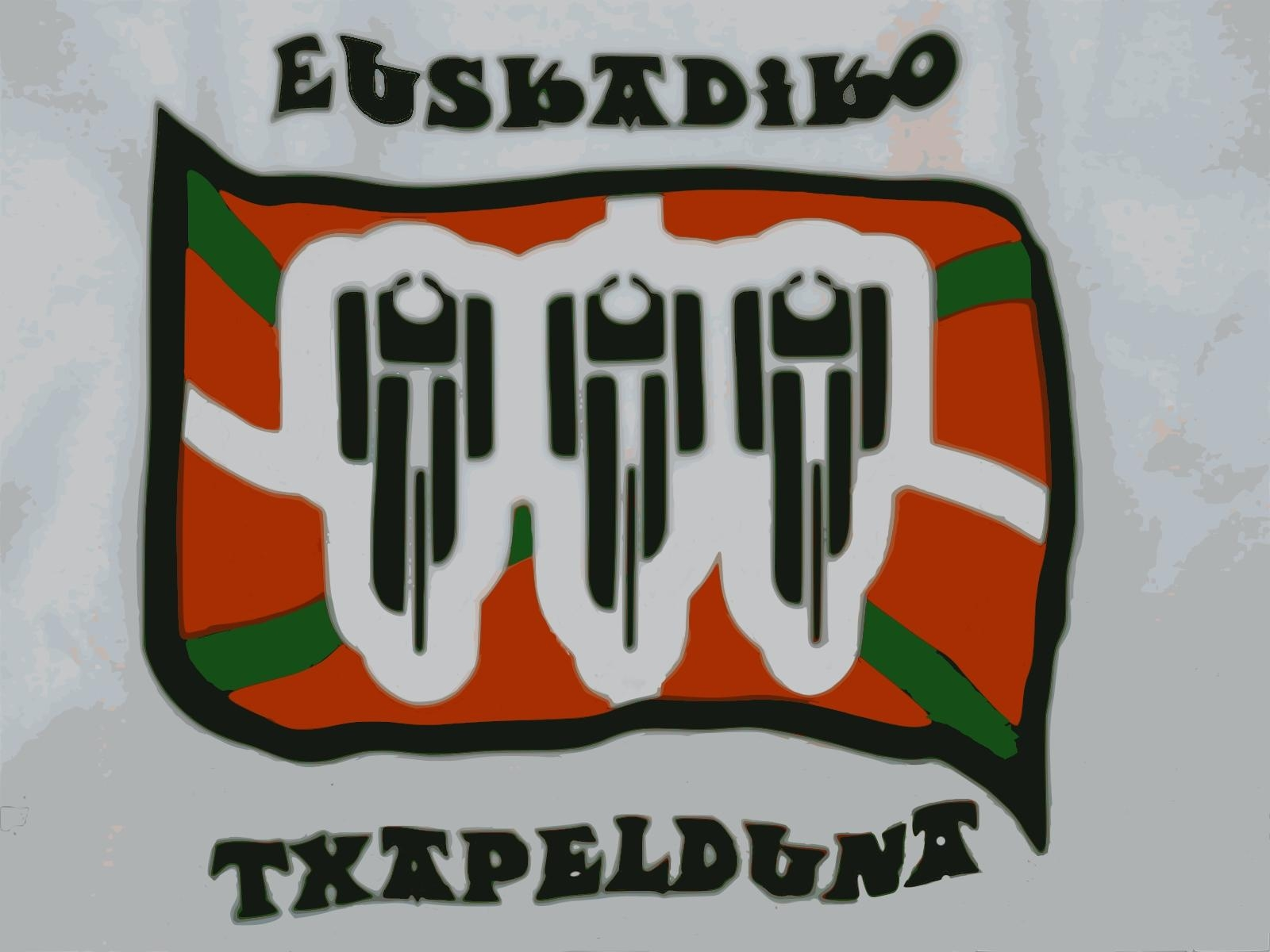 Euskadiko / Euskal Herriko txirrindularitza txapelduna